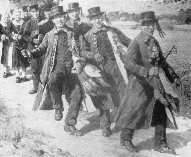 Hochzeitszug in Schleifer Region um 1905. Hornjoserbsce: Kwasny ćah, wokoło 1905